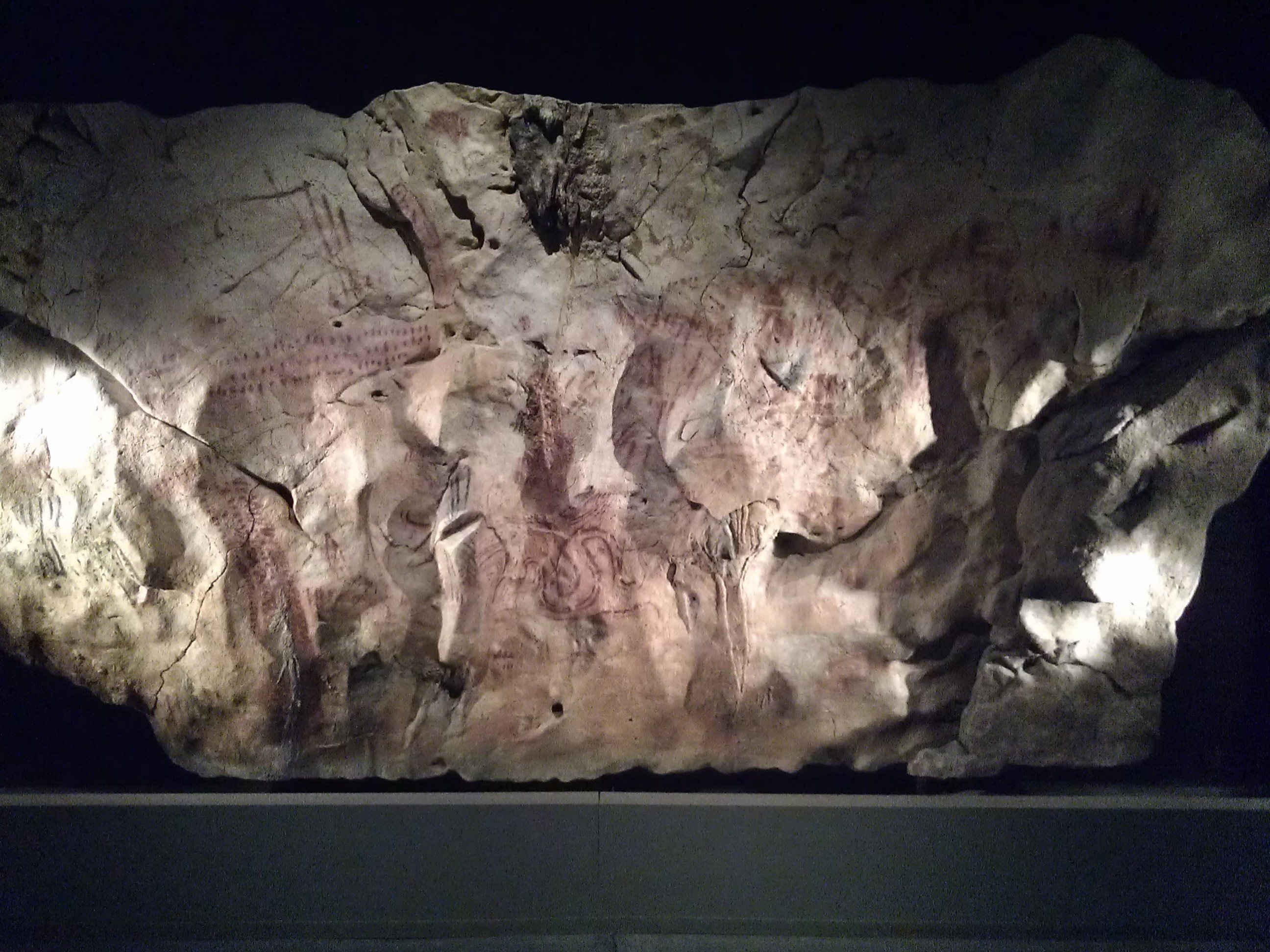 Parque de la Prehistoria de Teverga, Asturias (España). Réplica del panel principal, mitad izquierda, de la gran sala. Cueva Llonín (Asturias, España). Réplica por Matilde Múzquiz y Pedro Saura.